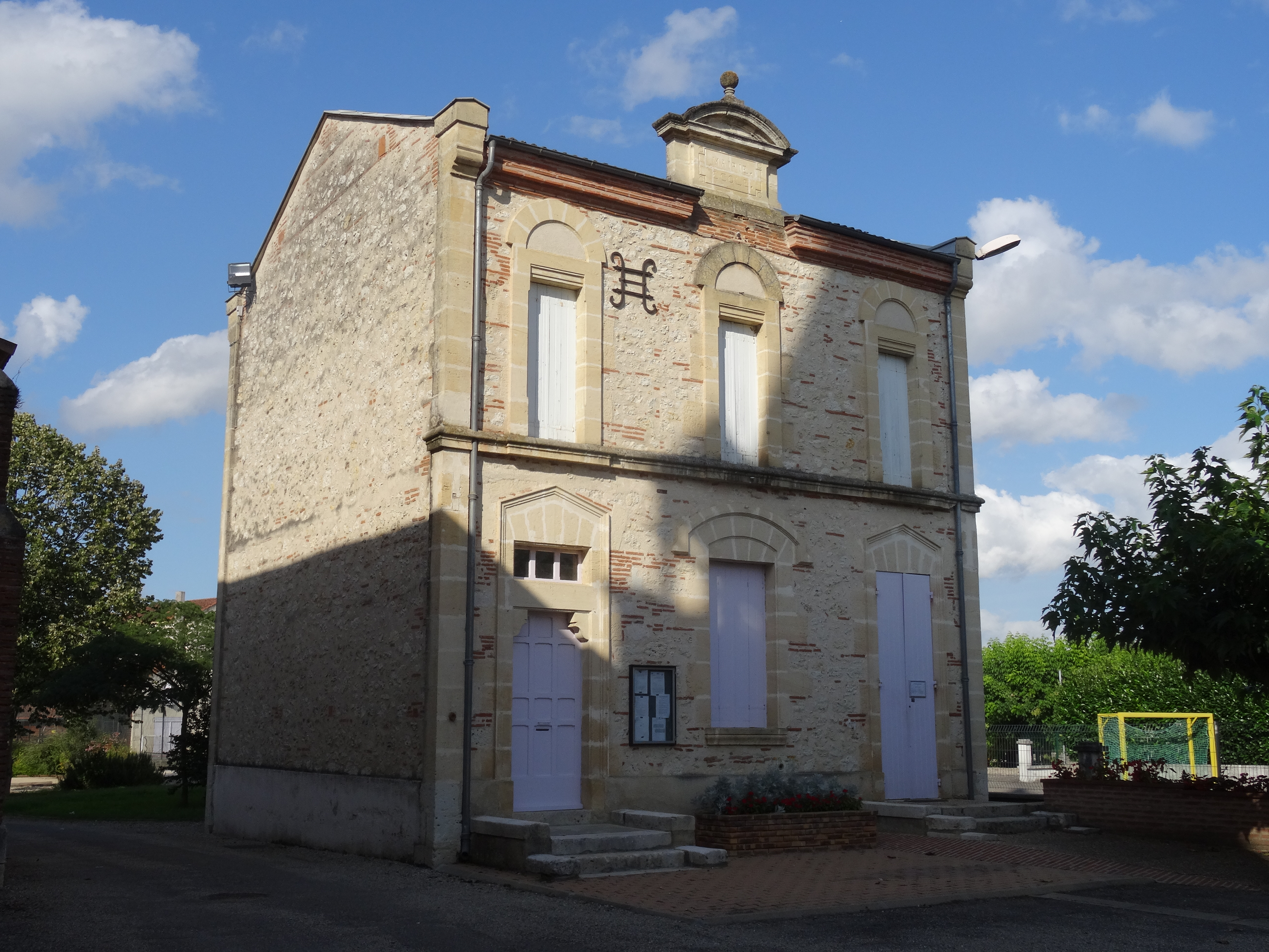 Sauveterre-Saint-Denis (47) : la mairie